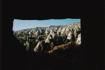 Goreme Turquie Cappadoce_2006_04.jpg